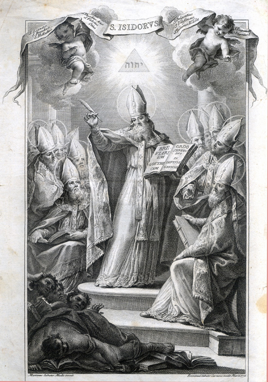 San Isidoro, Manuel Salvador Carmona, grabador, Manuel Salvador Maella, dibujo. Universidad de Navarra.